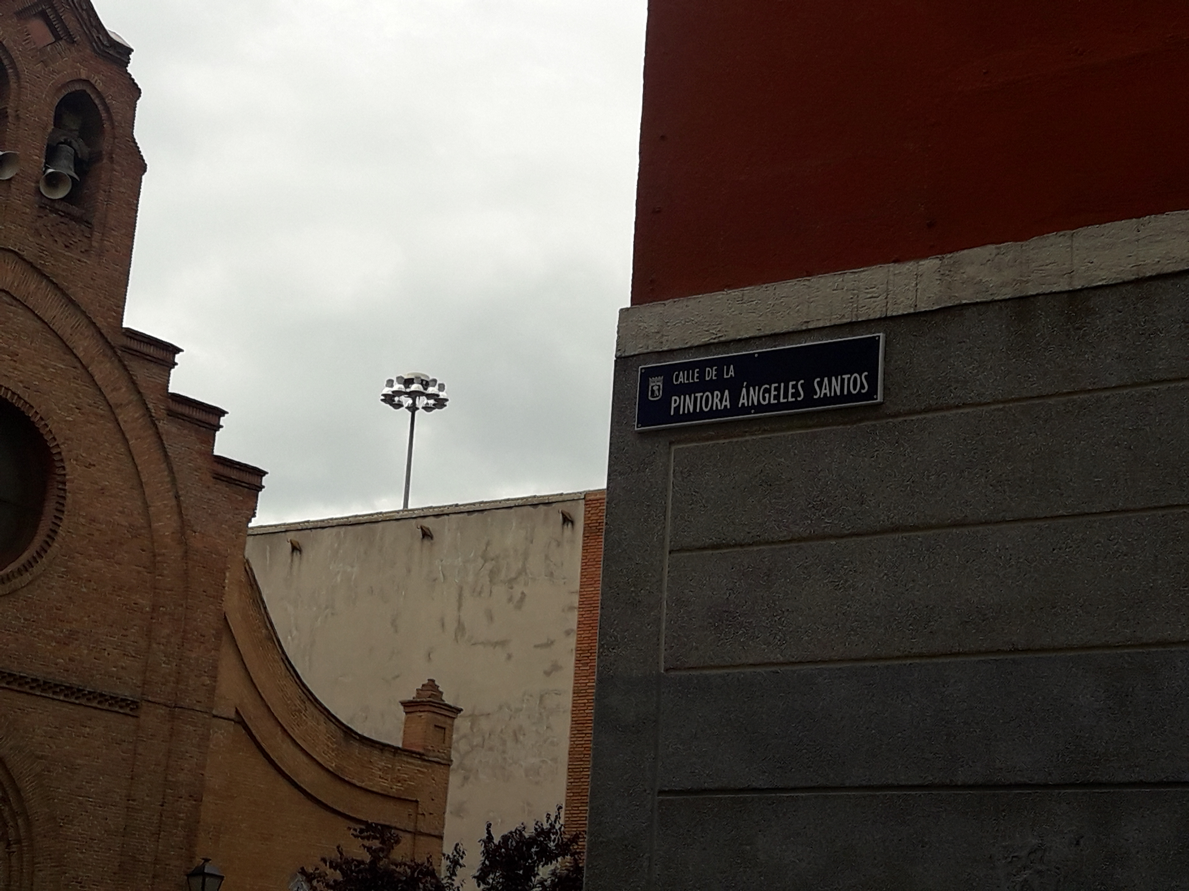 Con las recomendaciones realizadas por el Comisionado de la Memoria Histórica, el Pleno del Ayuntamiento de Madrid, en la sesión extraordinaria celebrada en abril de 2017, aprobó el cambio de denominación de calles, plazas y espacios públicos de la ciudad en las que se conmemoraba la sublevación militar, la Guerra Civil Española o la represión de la dictadura del General Franco. Tras el auto del Tribunal Superior de Justicia de Madrid, que desestimaba medidas cautelares contra este Acuerdo Plenario, el cambio de nombres en el callejero se ha hecho posible.